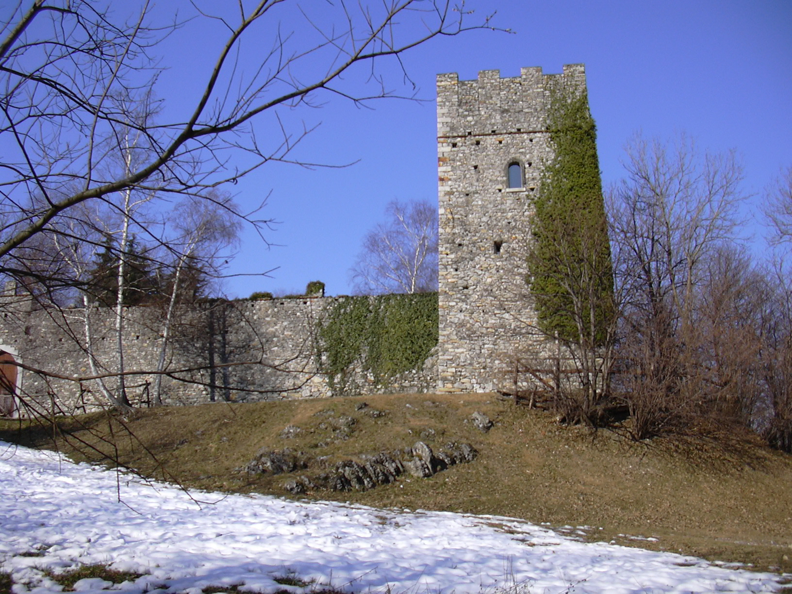 Rocca medioevale sita nel comune di Orino, provincia di Varese, all'interno del Parco regionale Campo dei Fiori. Veduta frontale